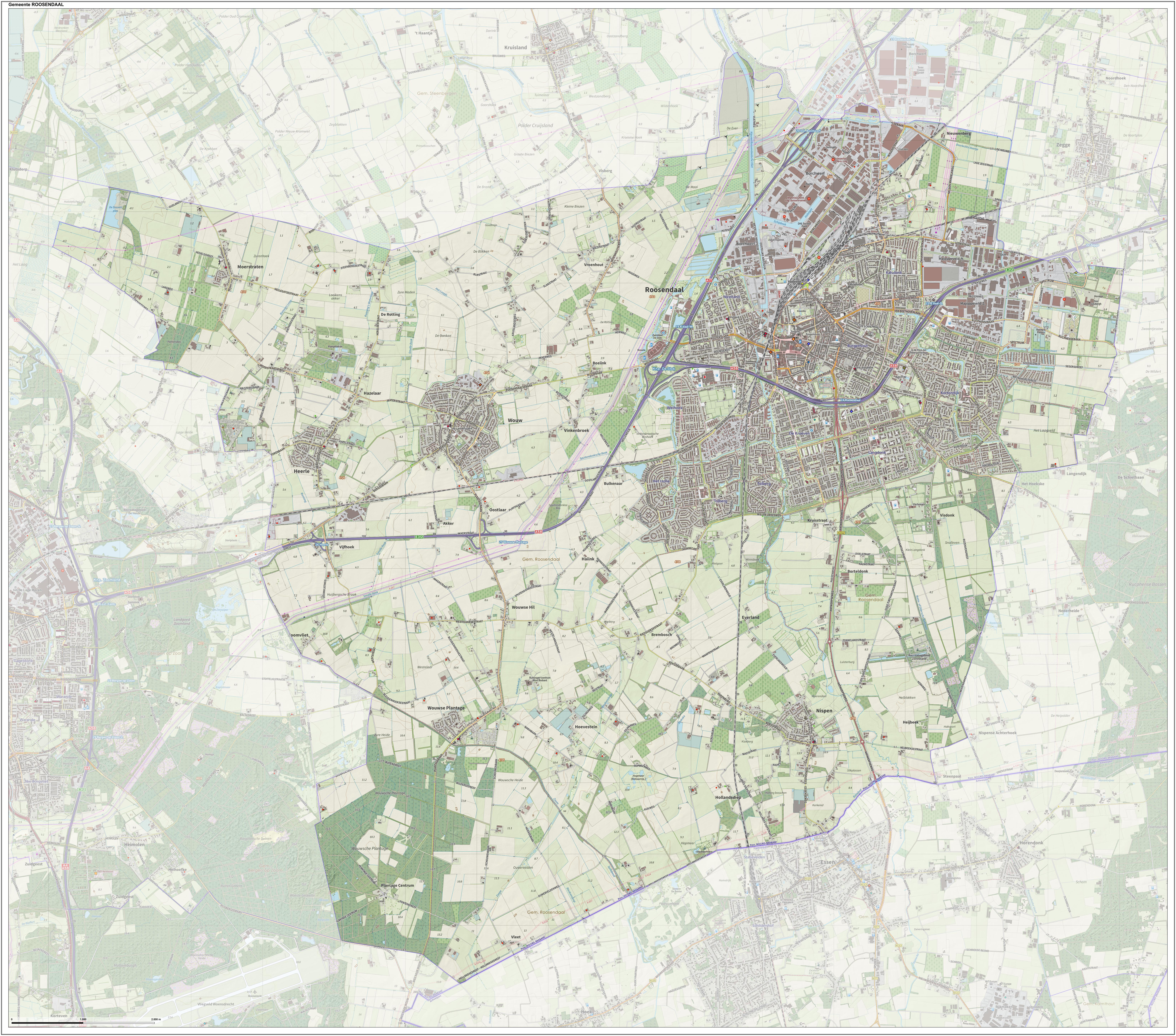 Topografische gemeentekaart. Resolutie: 400 pixels/km. Kaartbeeld samengesteld uit de open geodata van de Top10NL en Top25namen (Kadaster), Creative Commons-BY licentie. Gebouwvlakken uit open geodata BAG extract. Wegen uit de OpenStreetMap, OpenStreetMap community. Reliëfschaduw uit de Actuele Hoogtekaart AHN2. Samenstelling en kleurenschema: Jan-Willem van Aalst, met QGIS. Zie ook de Legenda.